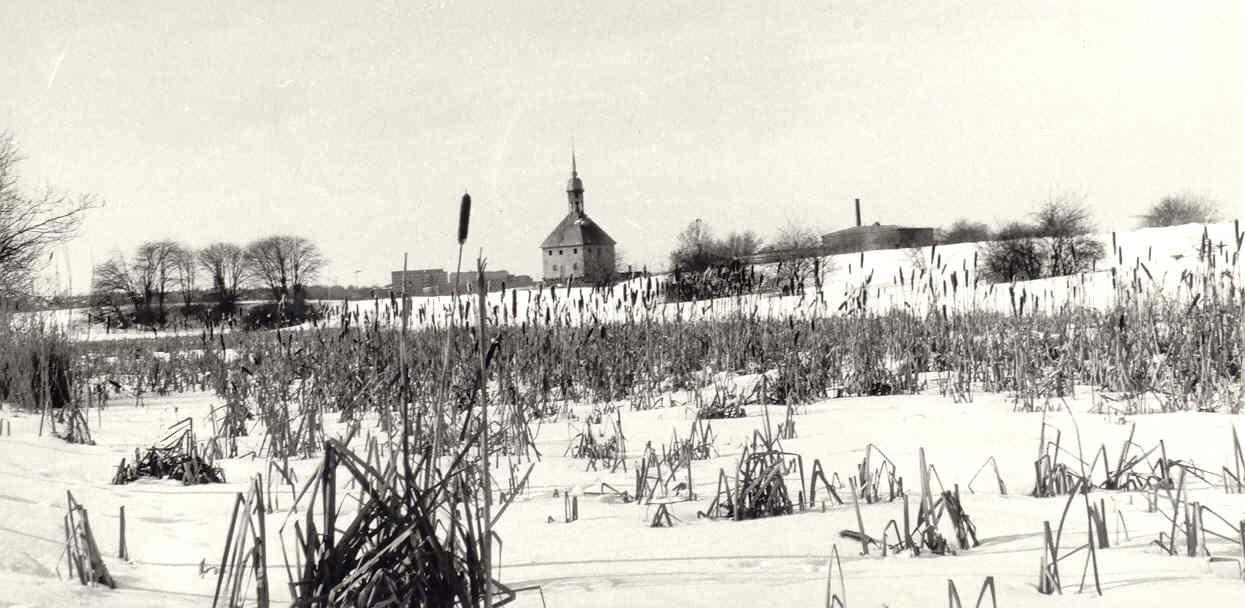 Johannisborgs slottsruin i Norrköping, omkring år 1985. En bild tagen av Harri Blomberg.